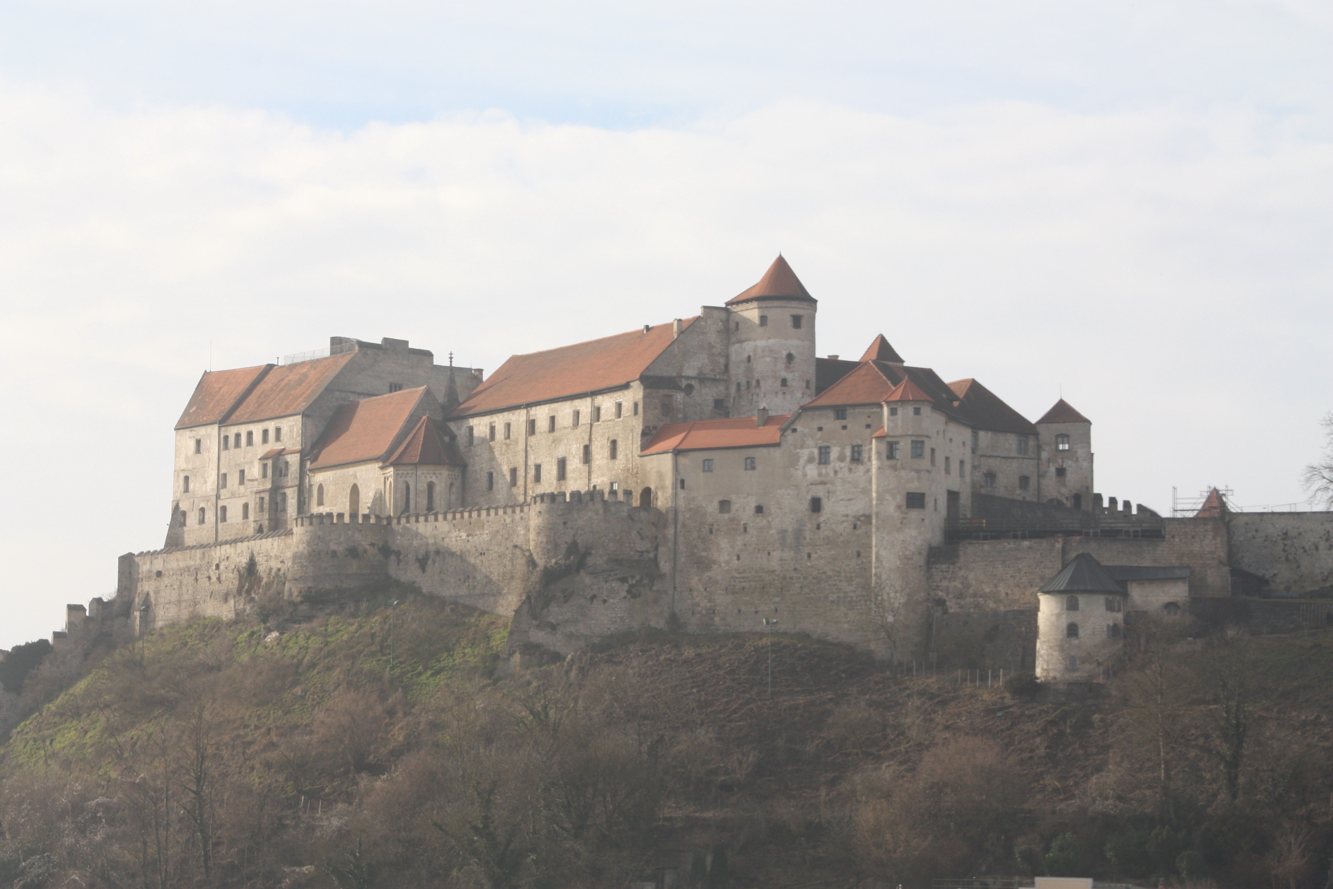 Burghausen